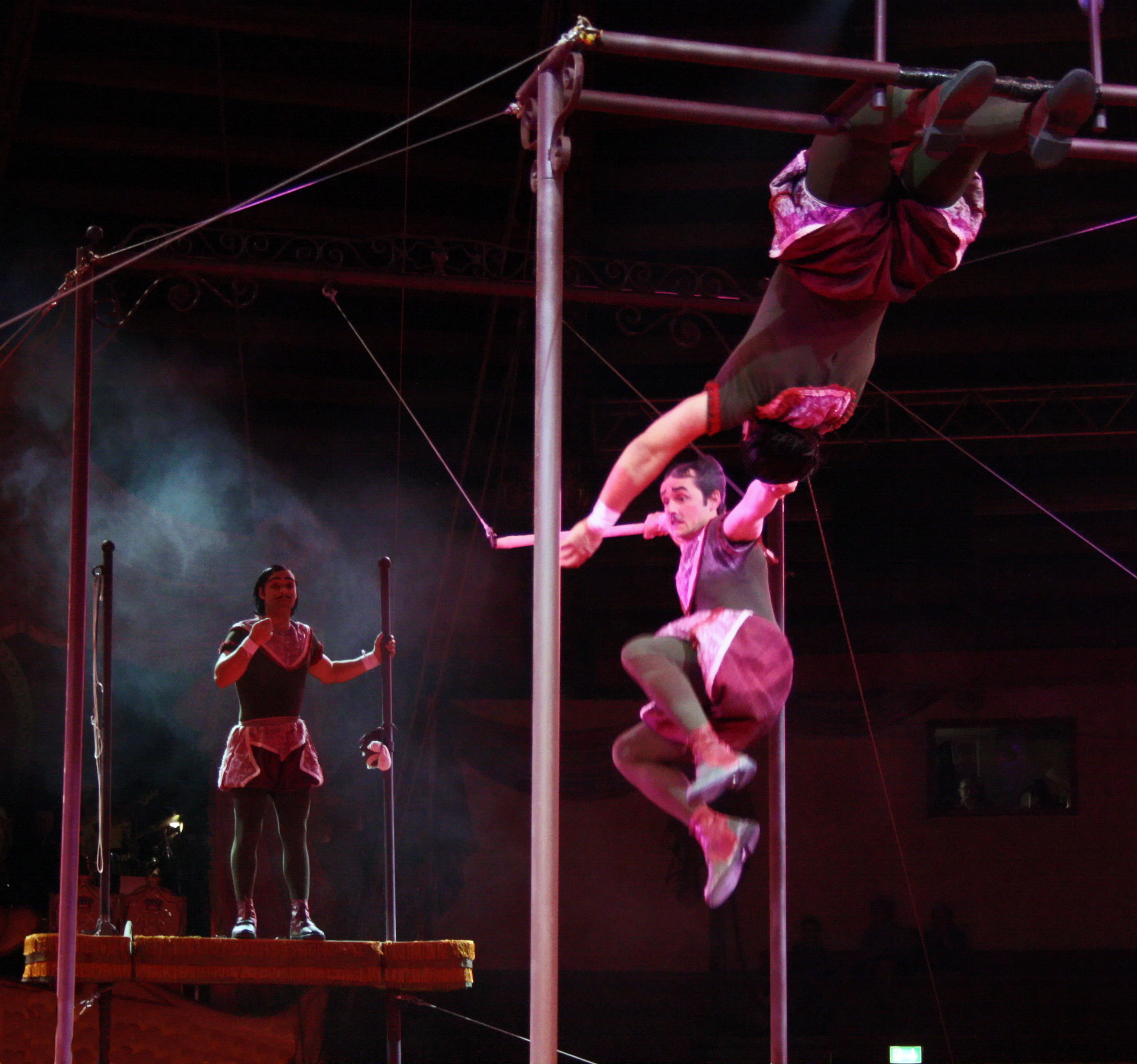 TITO MEDINA & THE GOOD COMPANY. Lustige Flugkünstler im Stile der guten alten Zeit. In Kostümen aus Großvaters Tagen lassen sie ihre Muskeln spielen und parodieren als "Alte Kameraden" im Stil des vergangenen Jahrhunderts.